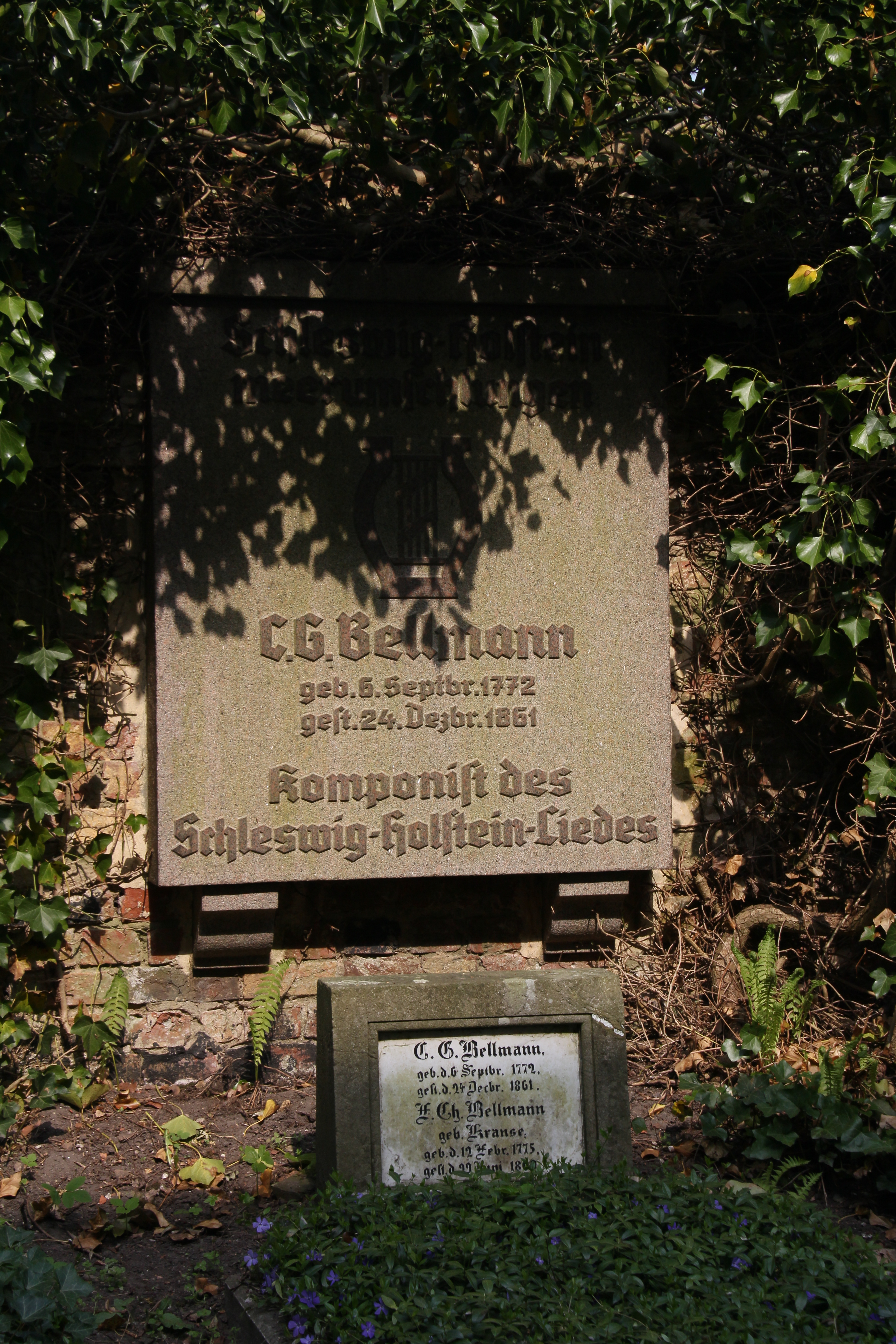 Grab von C.G. Bellmann, Autor des "Schleswig-Holstein-Lieds", in Holm